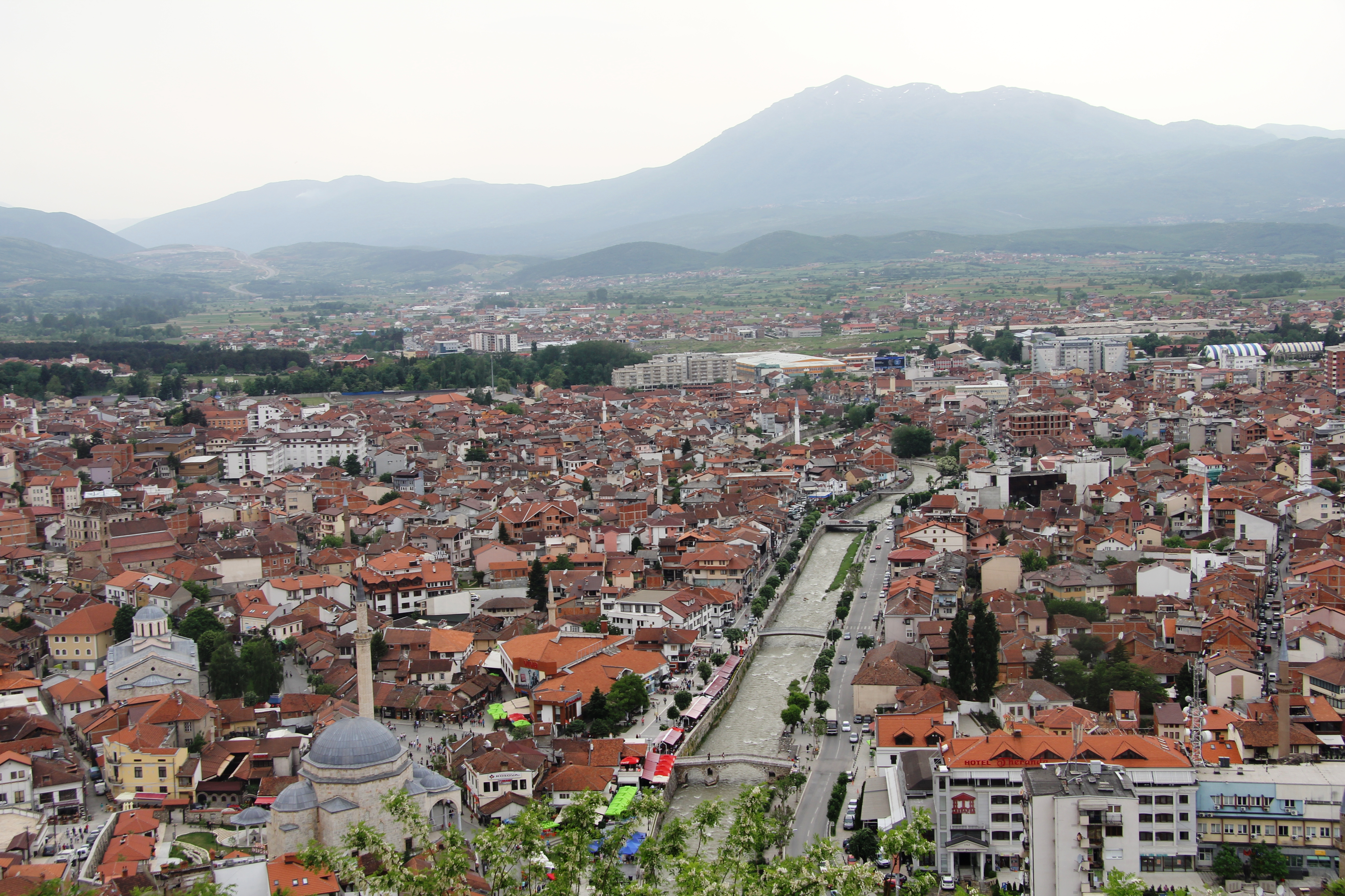 Pamje e Prizrenit nga Kalaja